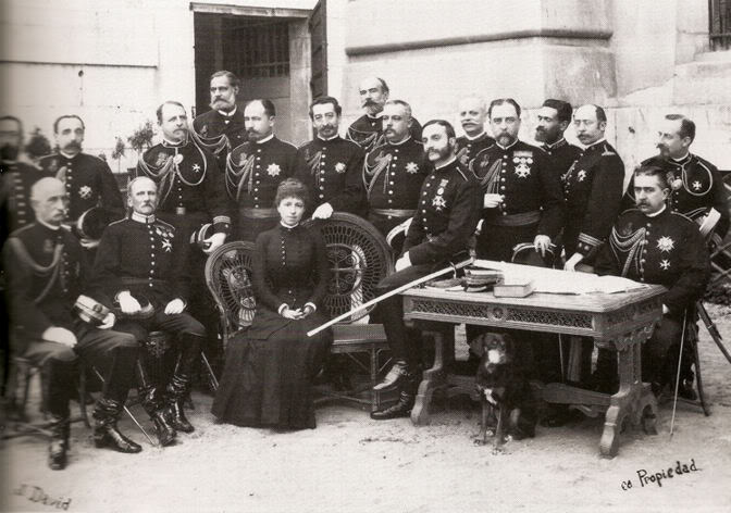 el Rey Alfonso XII , la Reina María Cristina y los miembros de su Cuarto Militar en una sesión de trabajo. Entre ellos el Teniente General y comandante del Real Cuerpo de Guardias Alabarderos D. Rafael Echagüe y Bermingham, Conde del Serrallo, Grande de España, Caballero Laureado de San Fernando.